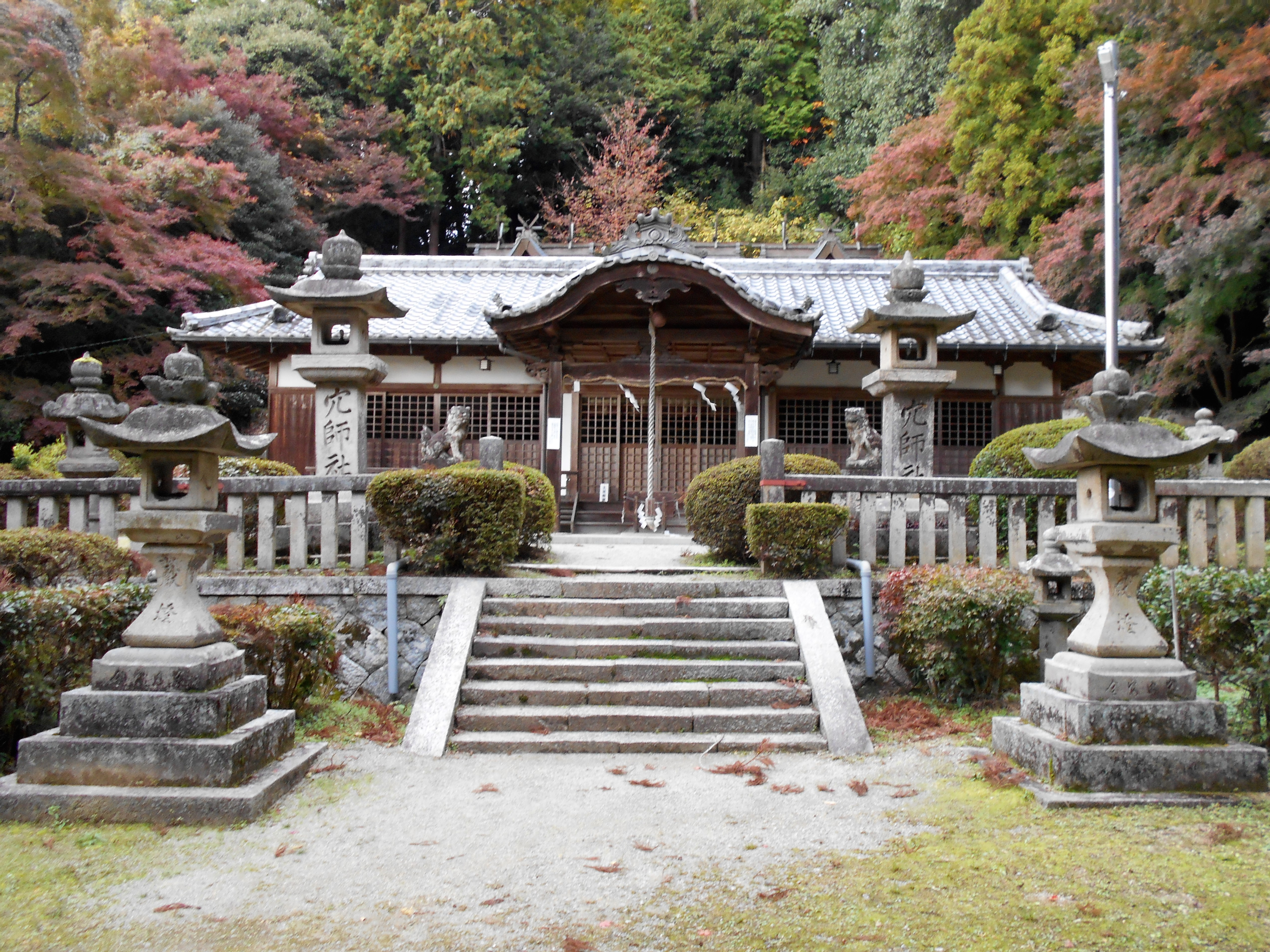 穴師坐兵主神社 拝殿（2017年11月）